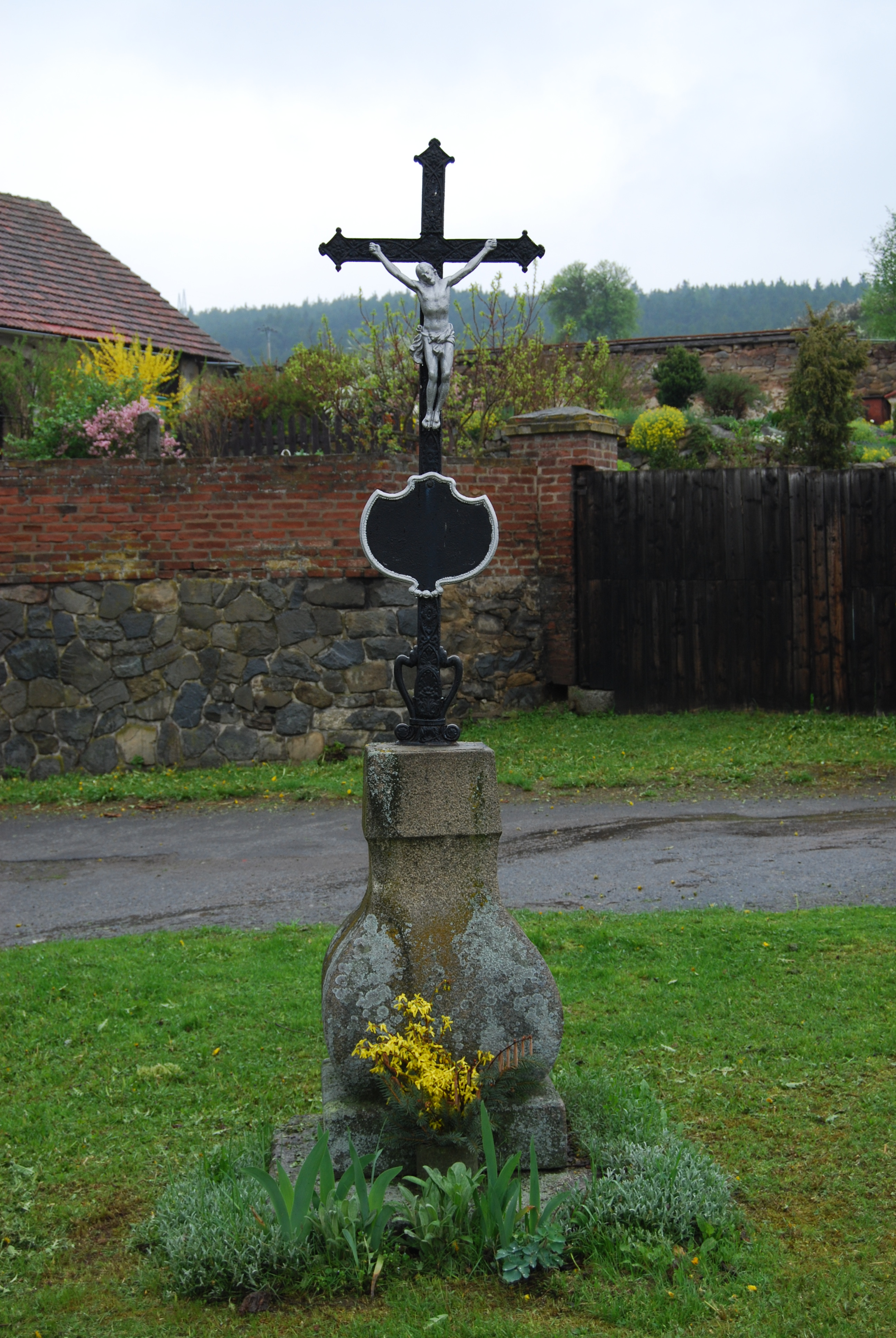 Kříž ve vesnici. Obec Obory v okrese Příbram, kraj Středočeský. Česká republika.